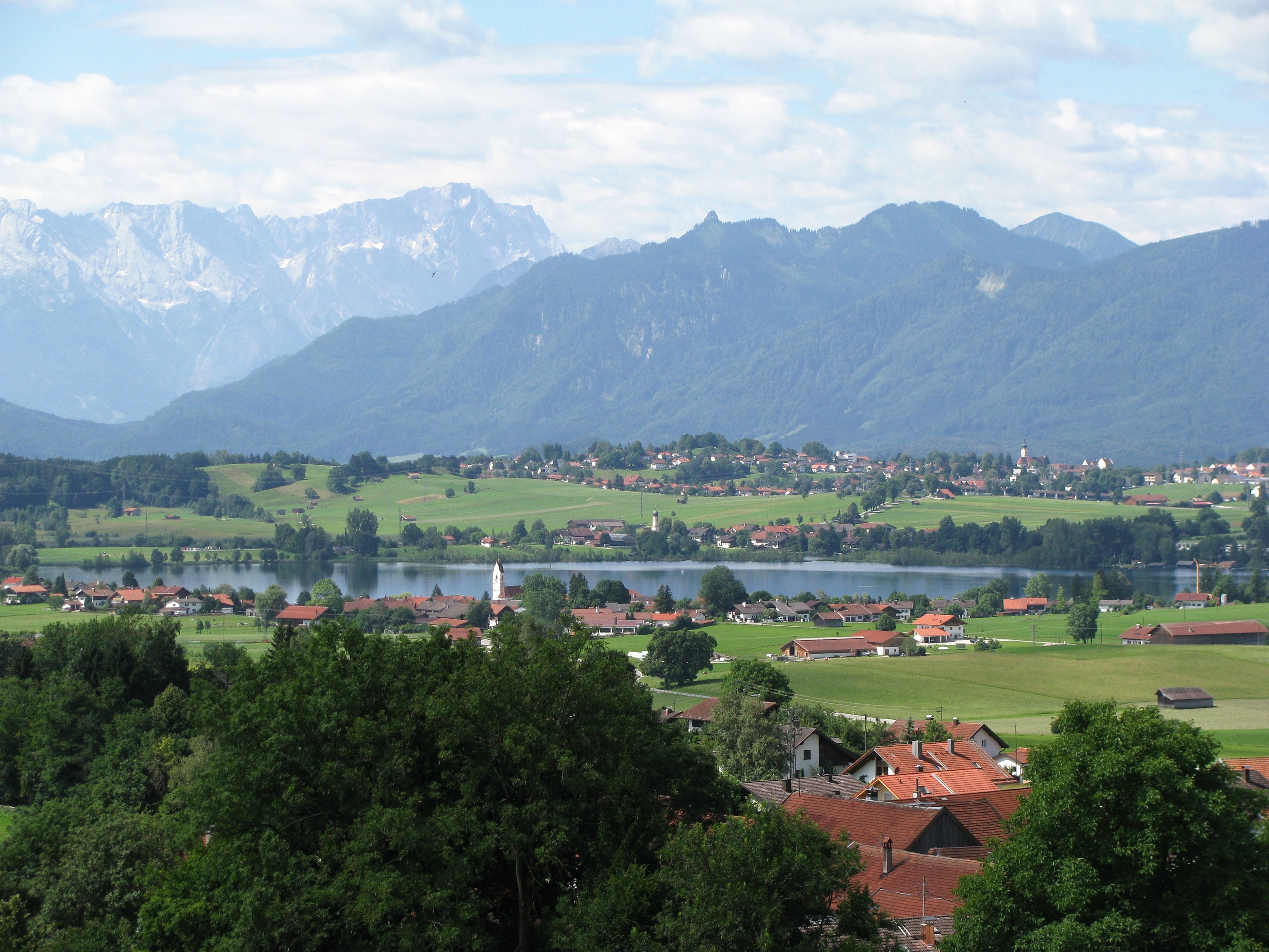 Riegsee (Ort) und Riegsee im Landkreis Garmisch-Partenkirchen; dahinter Froschhausen und Murnau und Berge des Ammer- und Wettersteingebirges